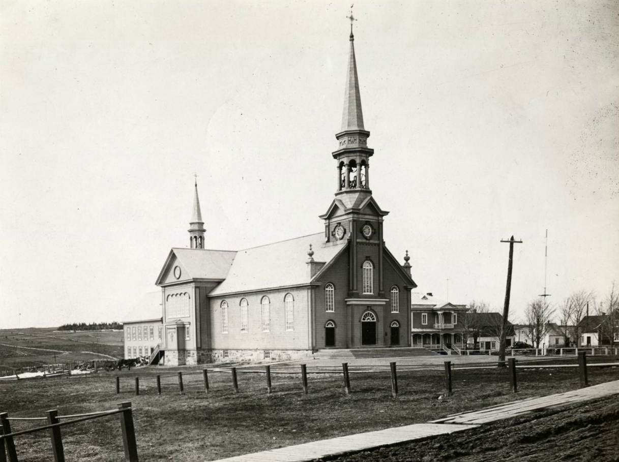 Église de Saint-Paul-de-Montminy vers 1925